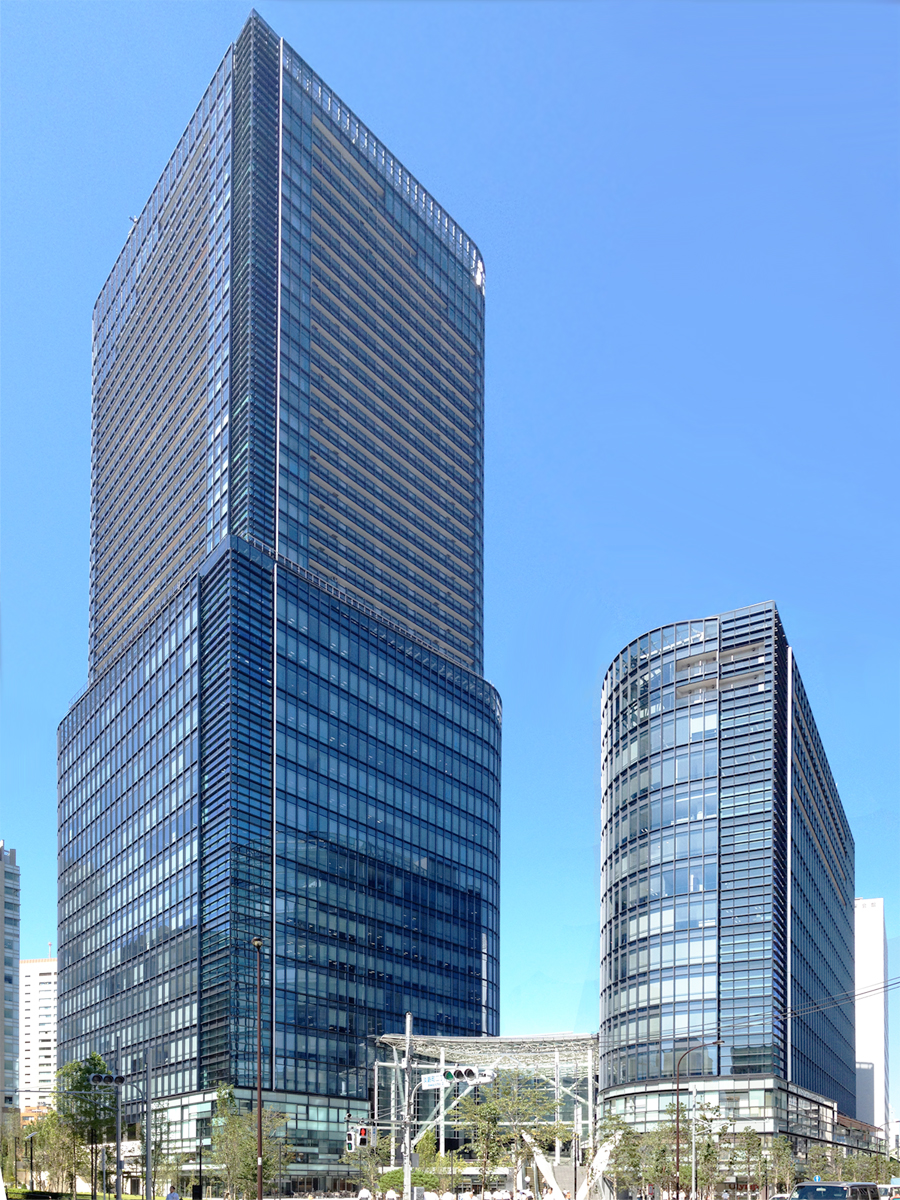 ワテラス（4枚の写真を合成）